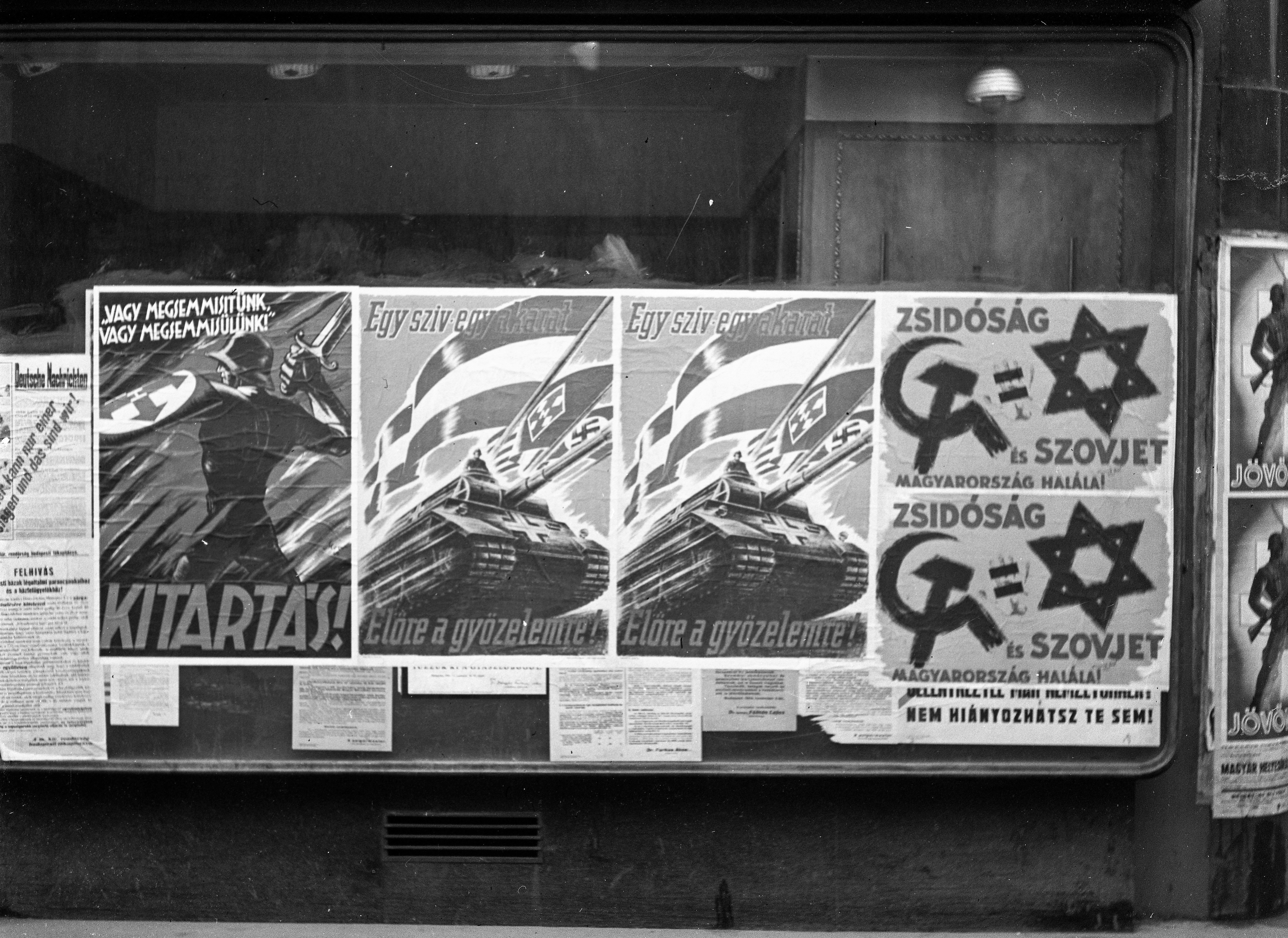 Location: Hungary, Budapest Tags: poster, György Szennik-grafika